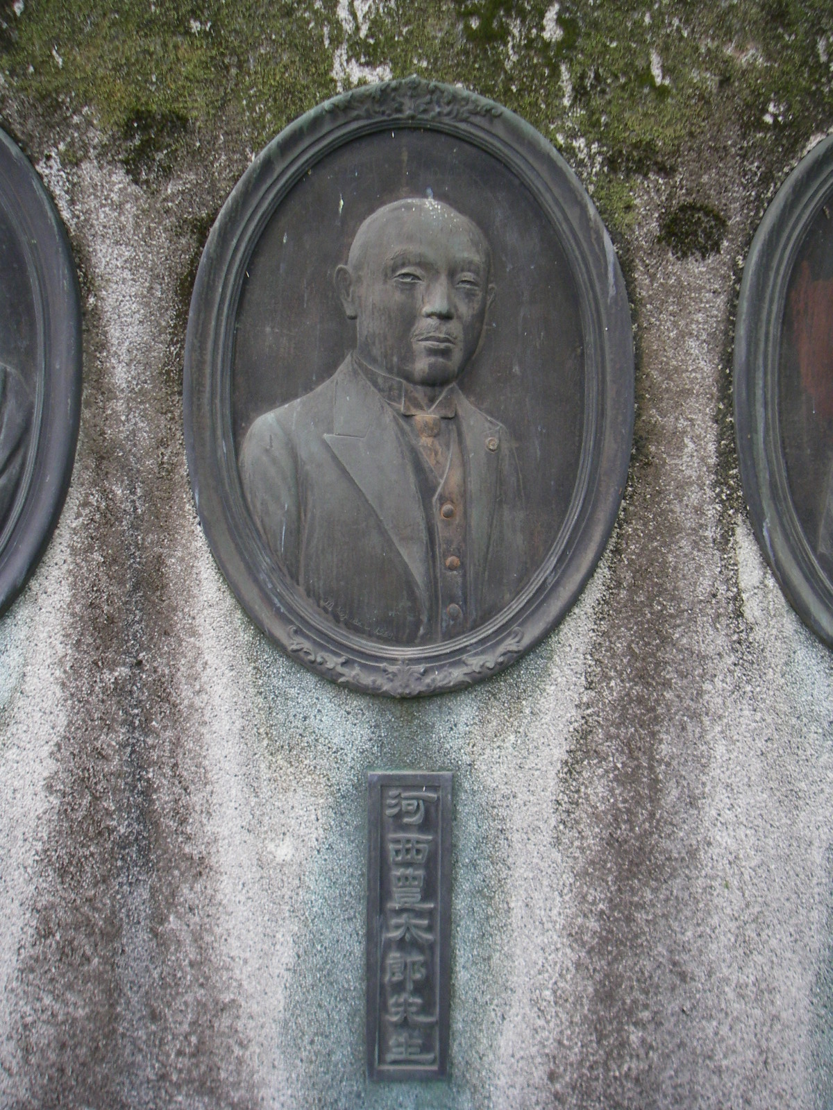 河西豊太郎先生